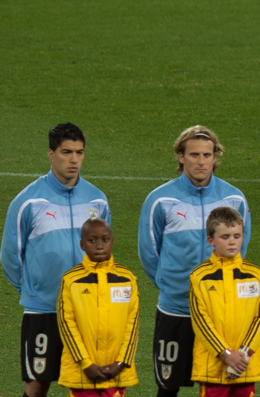 Luis Suárez